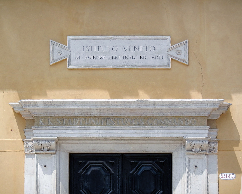 Venedig, Eingang zum ehemaligen K.K.Stadt- und Festungskommando der österreichischen Verwaltung vor 1866